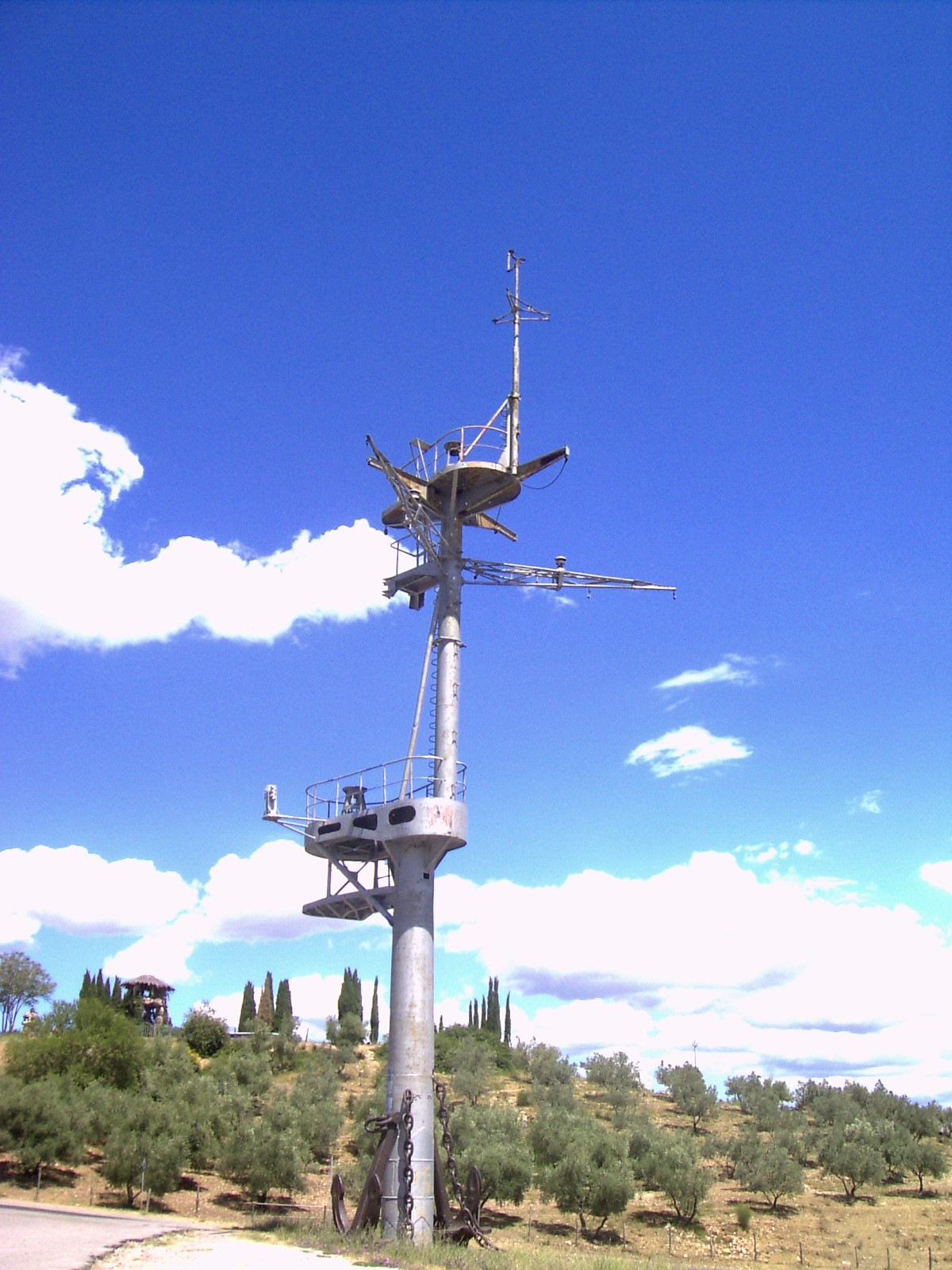 Montecuccoli cruiser's mast